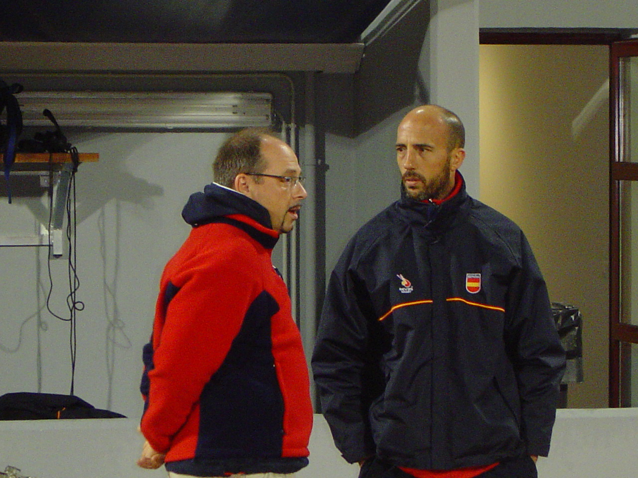 En conversación